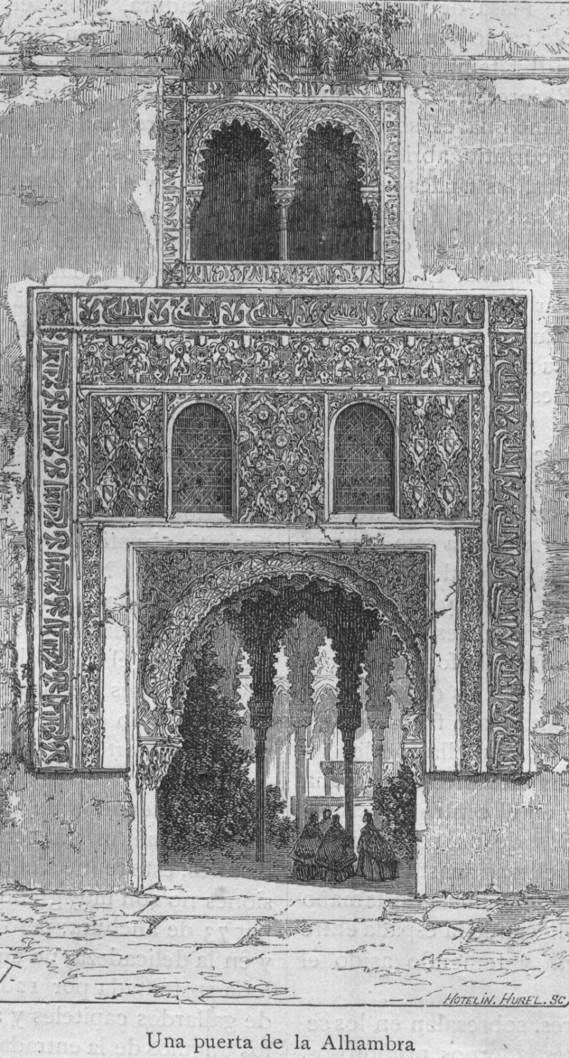 Una puerta de la Alhambra de Granada